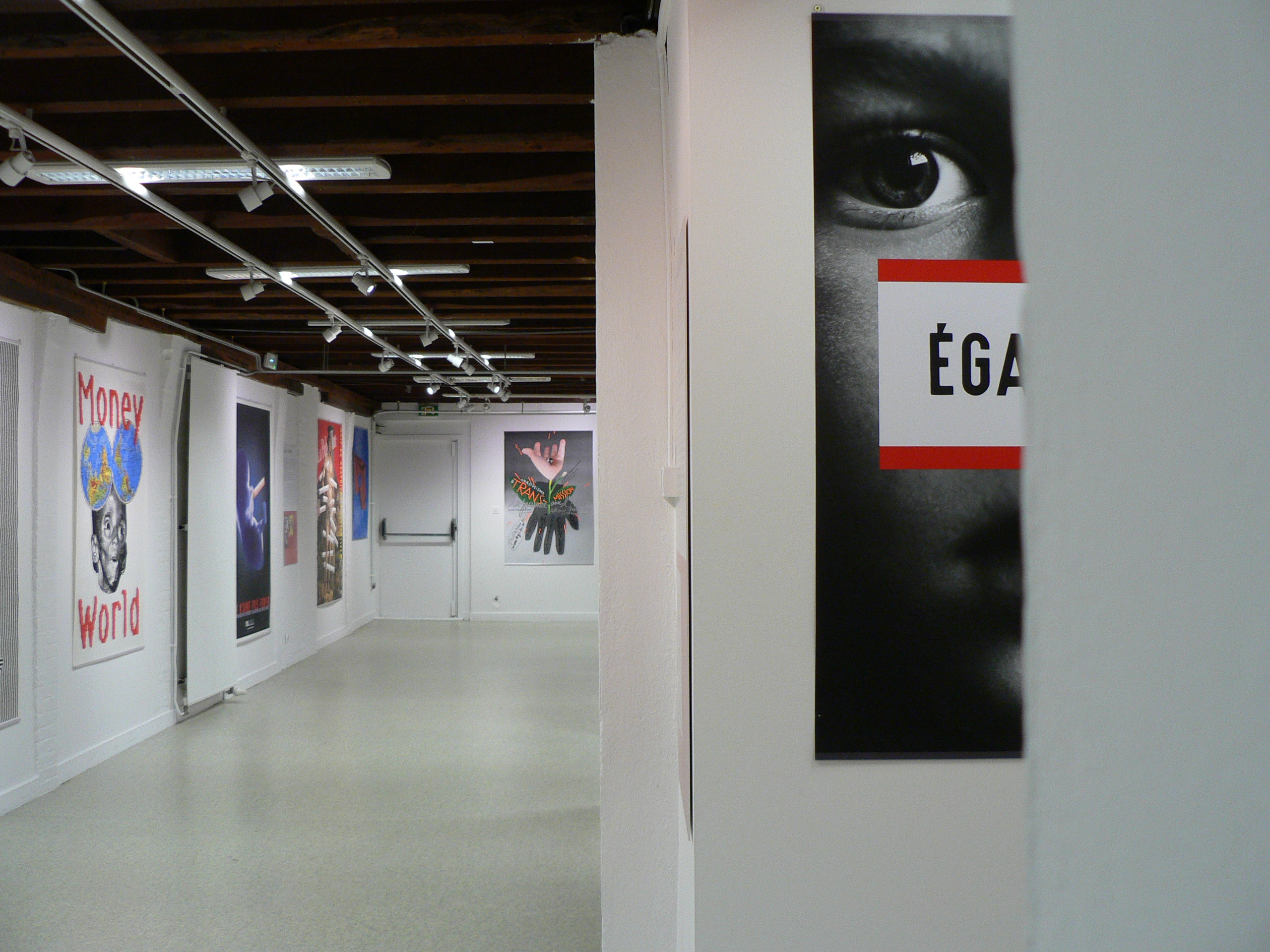 "« Merci Henryk ! » Hommage à Henryk Tomaszewski (1914-2005)", exposition aux Moulins de Villancourt, du 17/11/2018 au 31/01/2019, dans le cadre du Mois du Graphisme dédié au thème "Pologne. Une révolution graphique". Moulins de Villancourt, Le Pont-de-Claix, Isère, AuRA, France.